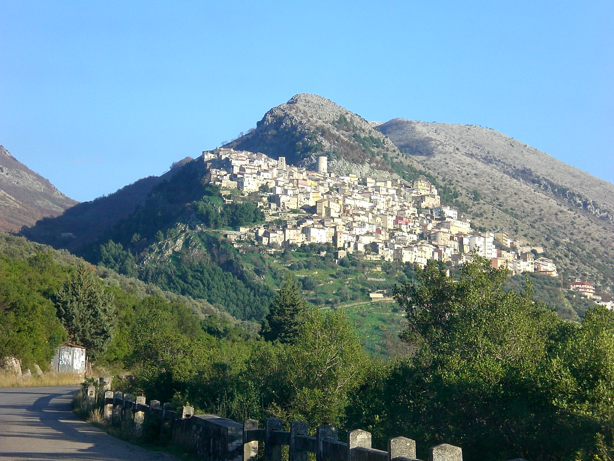 Veduta di Castelcivita, e Alburni. Parco nazionale del Cilento, Vallo di Diano e Alburni — Campania.